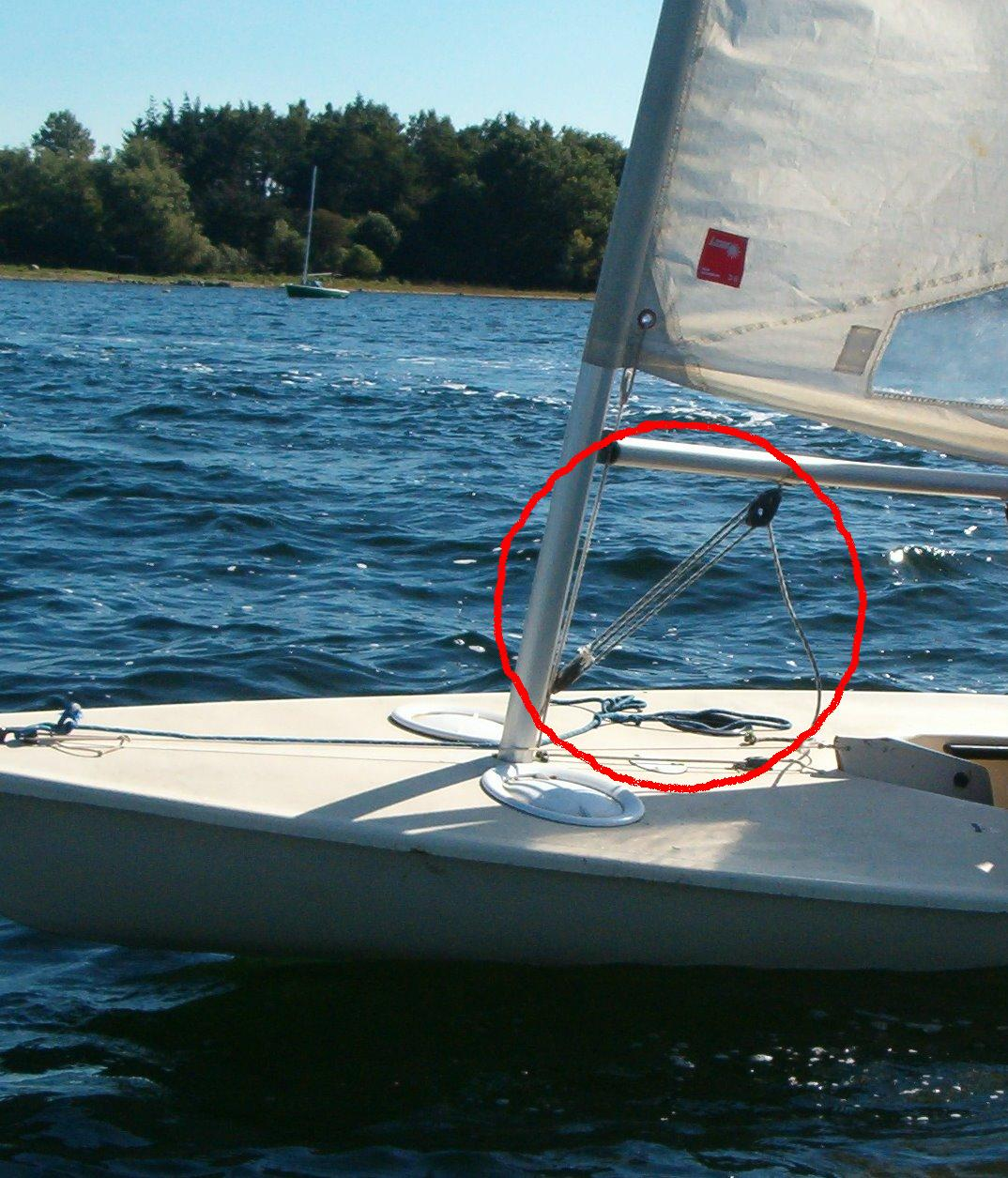 Kicking strap / boom vang